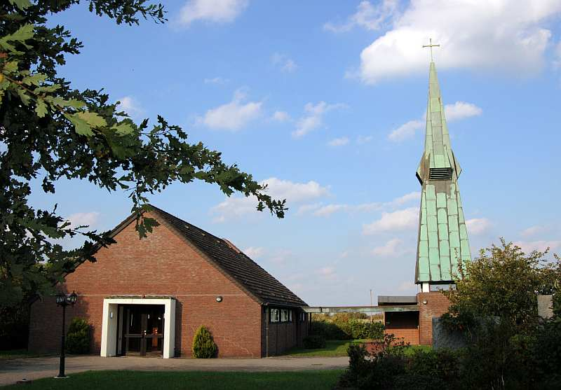 Kapelle in Hetlingen der Evangelisch-Lutherischen Kirchengemeinde Sankt Gabriel Haseldorf - Hetlingen